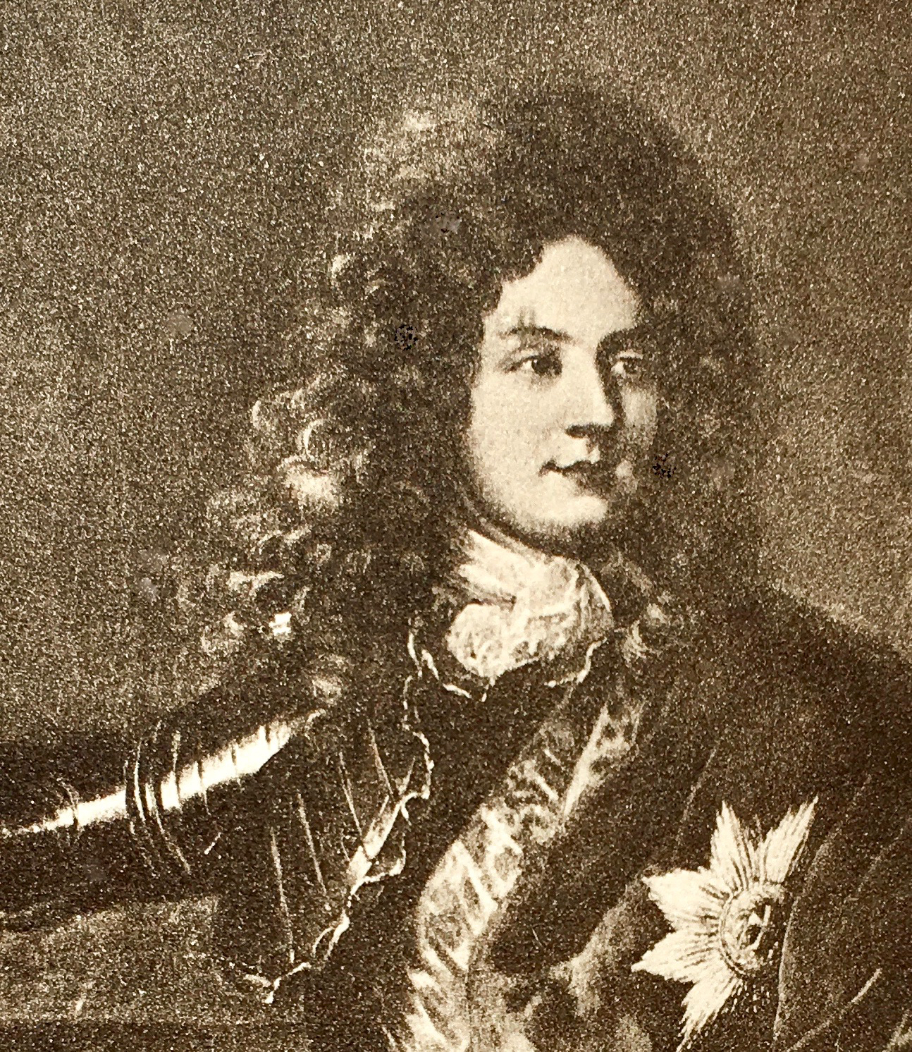 Christian Gyldenløve, greve af Samsøe, efter Hyacinthe Rigaud. Fra Danmarks Adels Aarbog